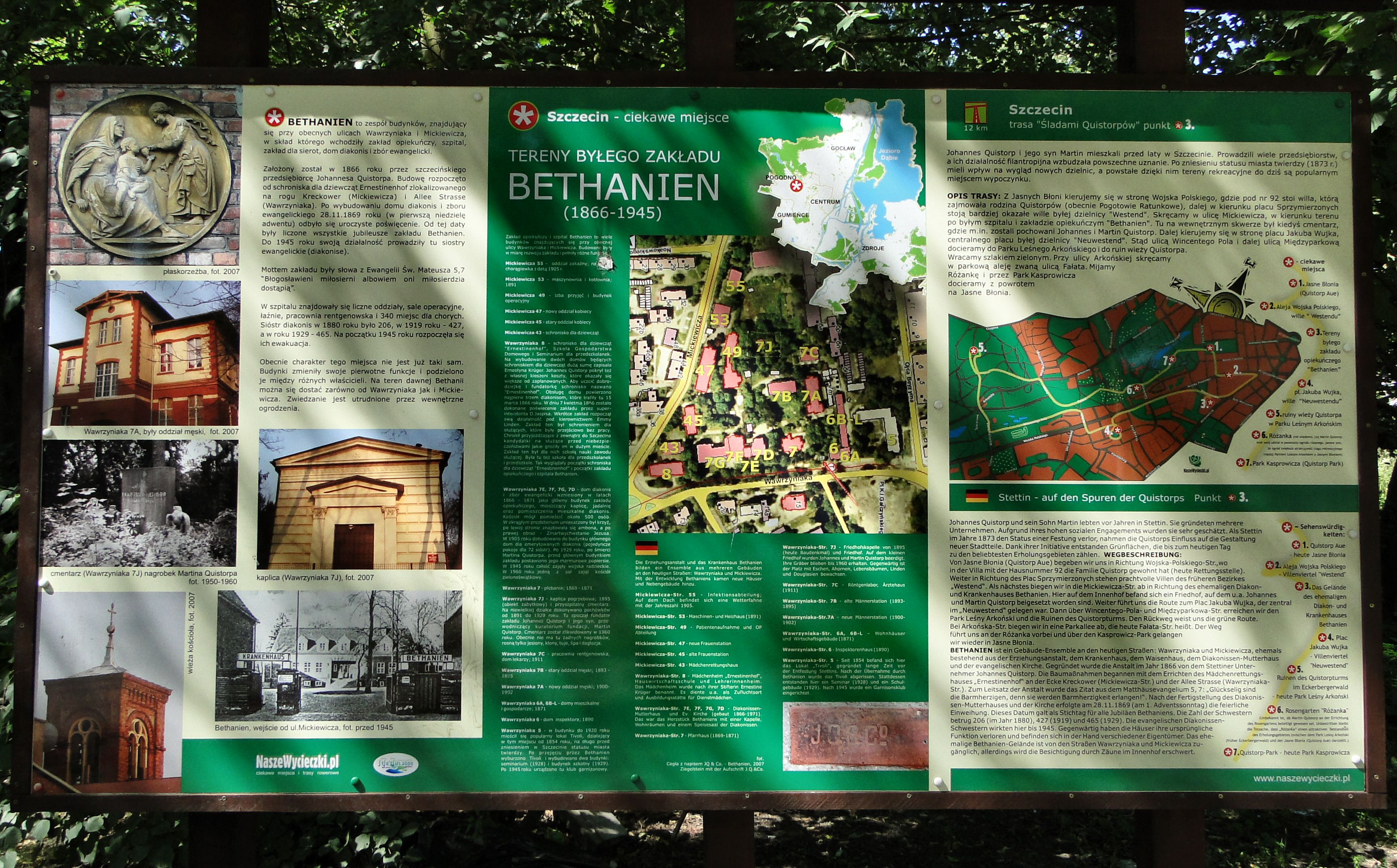 Tablica informacyjna o dawnym Zakładzie Opiekuńczym "Bethanien" w Szczecinie